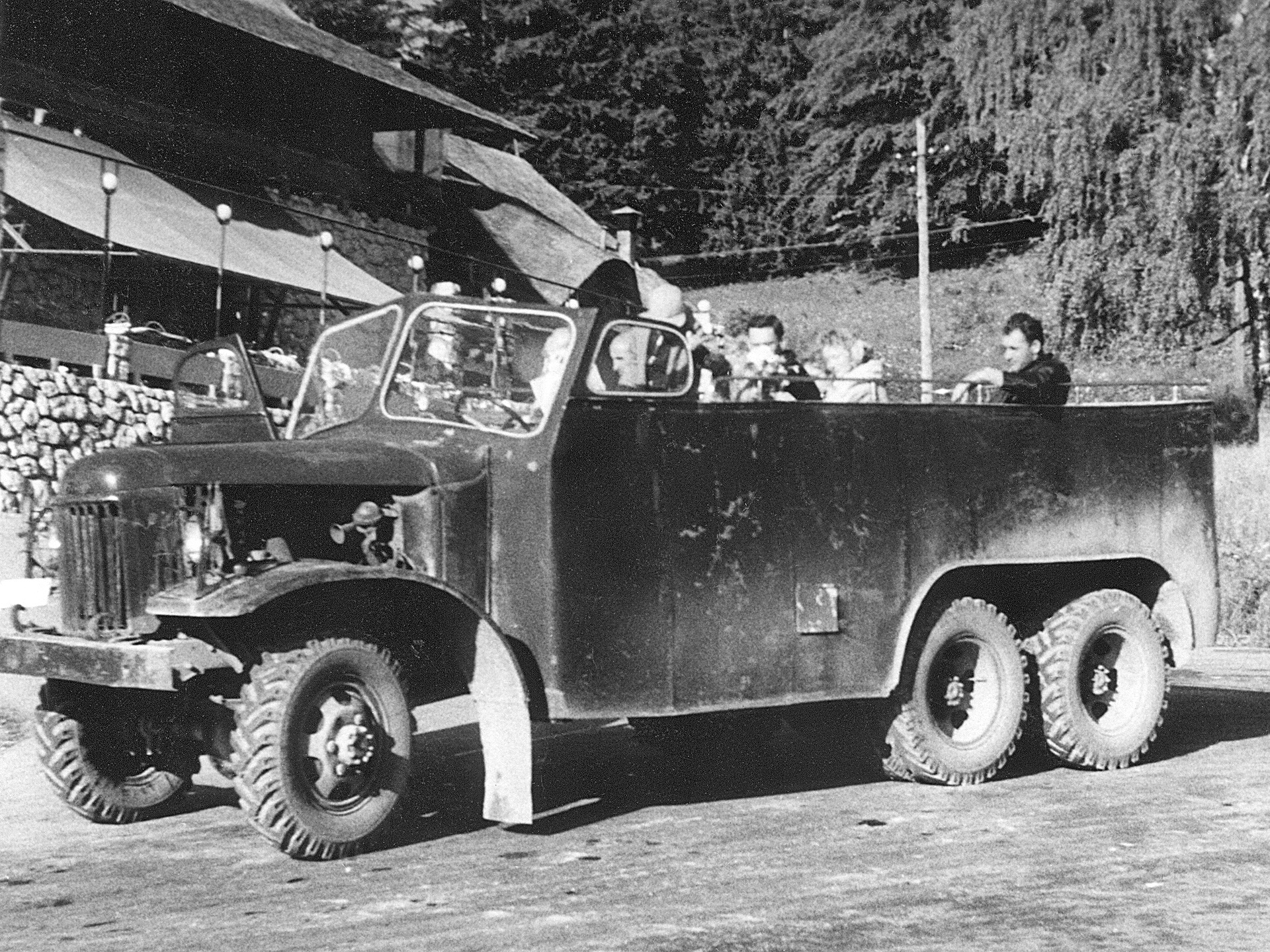 Ein LKW des Nutzfahrzeugherstellers Roman diente dem Personenverkehr zwischen Brașov und Poiana Brașov. Er steht abfahrtbereit am Sporthotel in Poiana Brașov im Juli 1964.